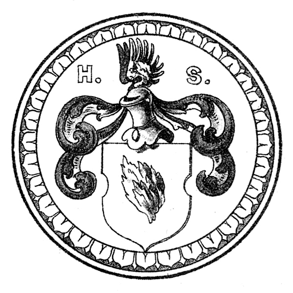 Wappen der Heilbronner Patrizier Spölin